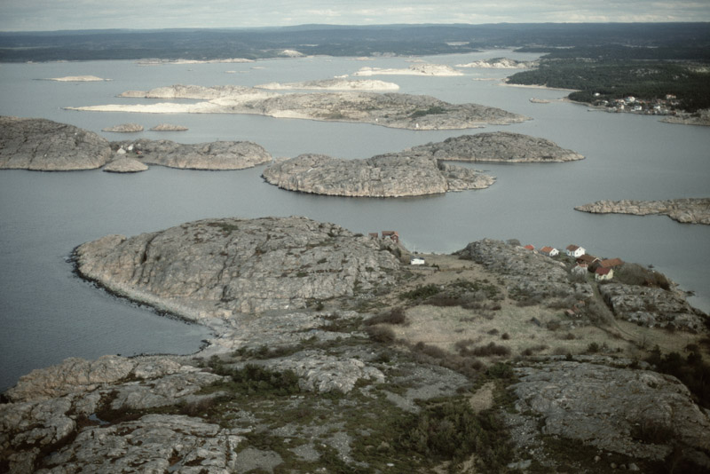 Motiv: Lindö Nyckelord: Flygbilder, Riksintressen Kategori: Skärgårdsby, Kust- och skärgårdsmiljöLindö